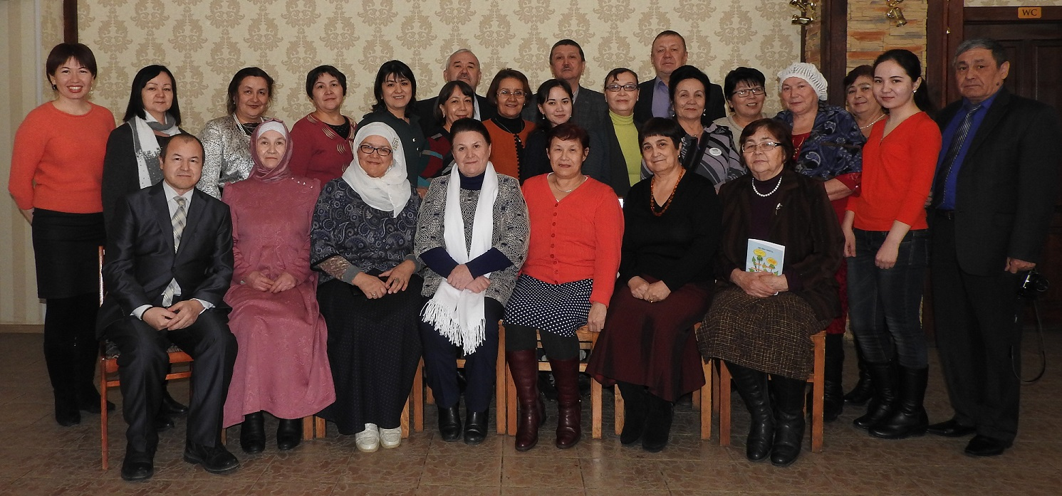 Башҡортса: 2017 йылдың 18 февралендә "Иҙел" кафеһында вики-осрашыу.